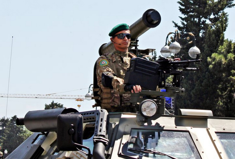 Военный парад, в Баку 26 июня 2011 год.